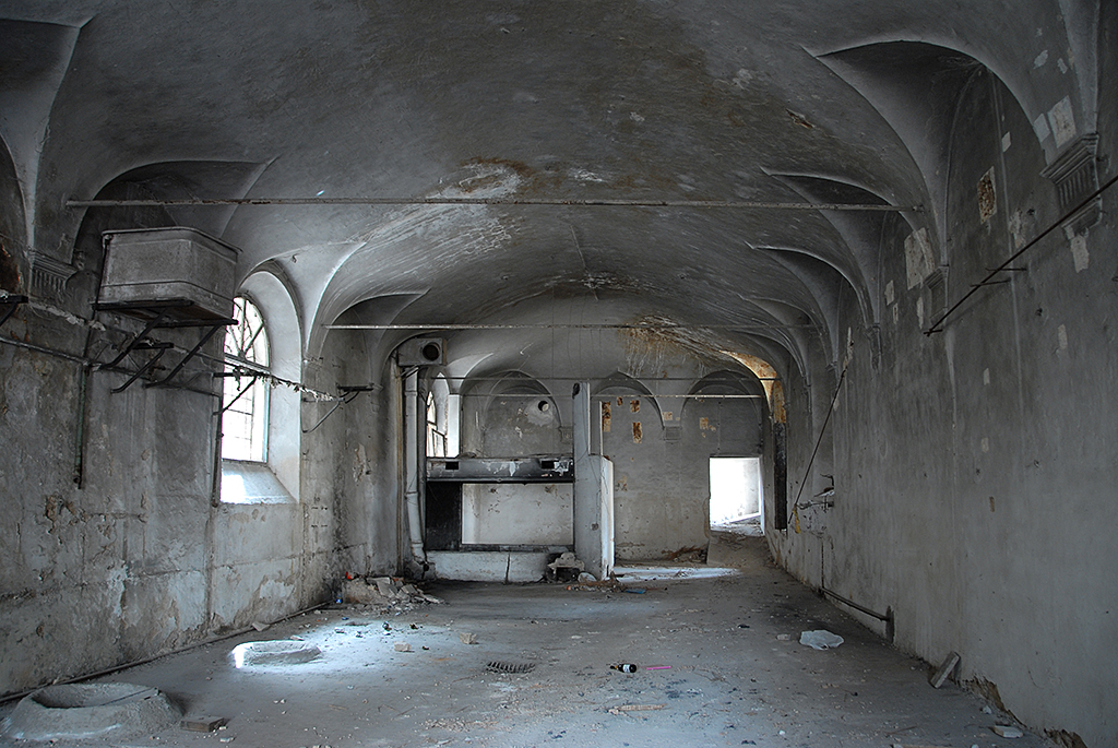 interno